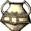 Цртеж пехара Белегишке културе, пронађеног на локалитету Стојића гумно у Белегишу.